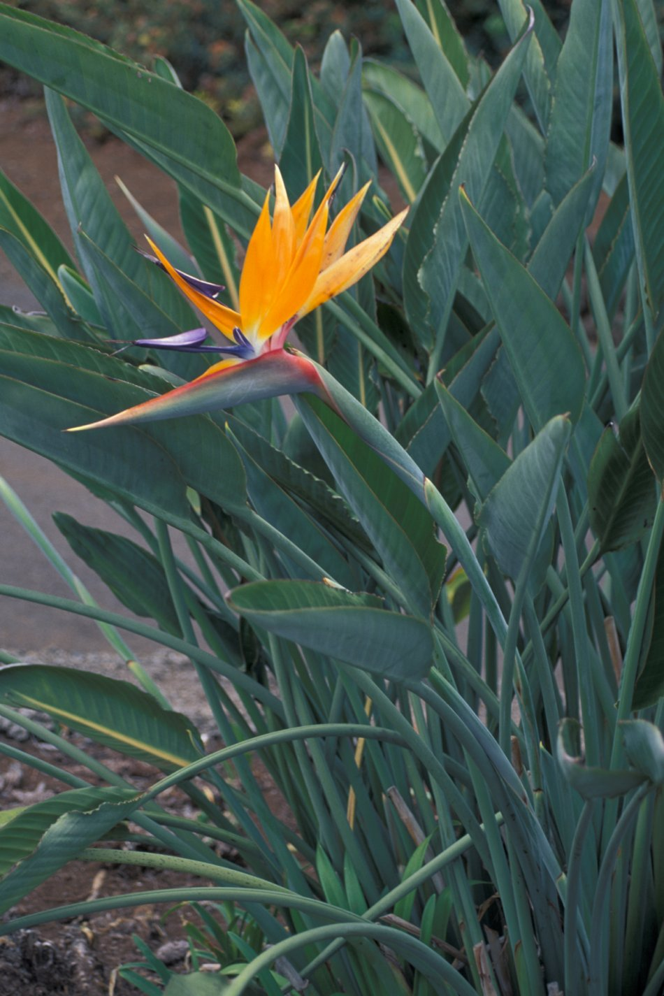 Fiore della Strelitzia reginae